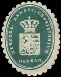 Sealing stamp Title: H. Anhalt. Consistorium Dessau Description: dunkelgrün, weiß, geprägt Place: Dessau size: 4x3 cm